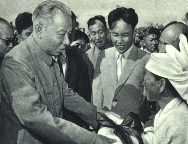 1963-11 1963 刘少奇访问朝鲜 崔庸健陪同